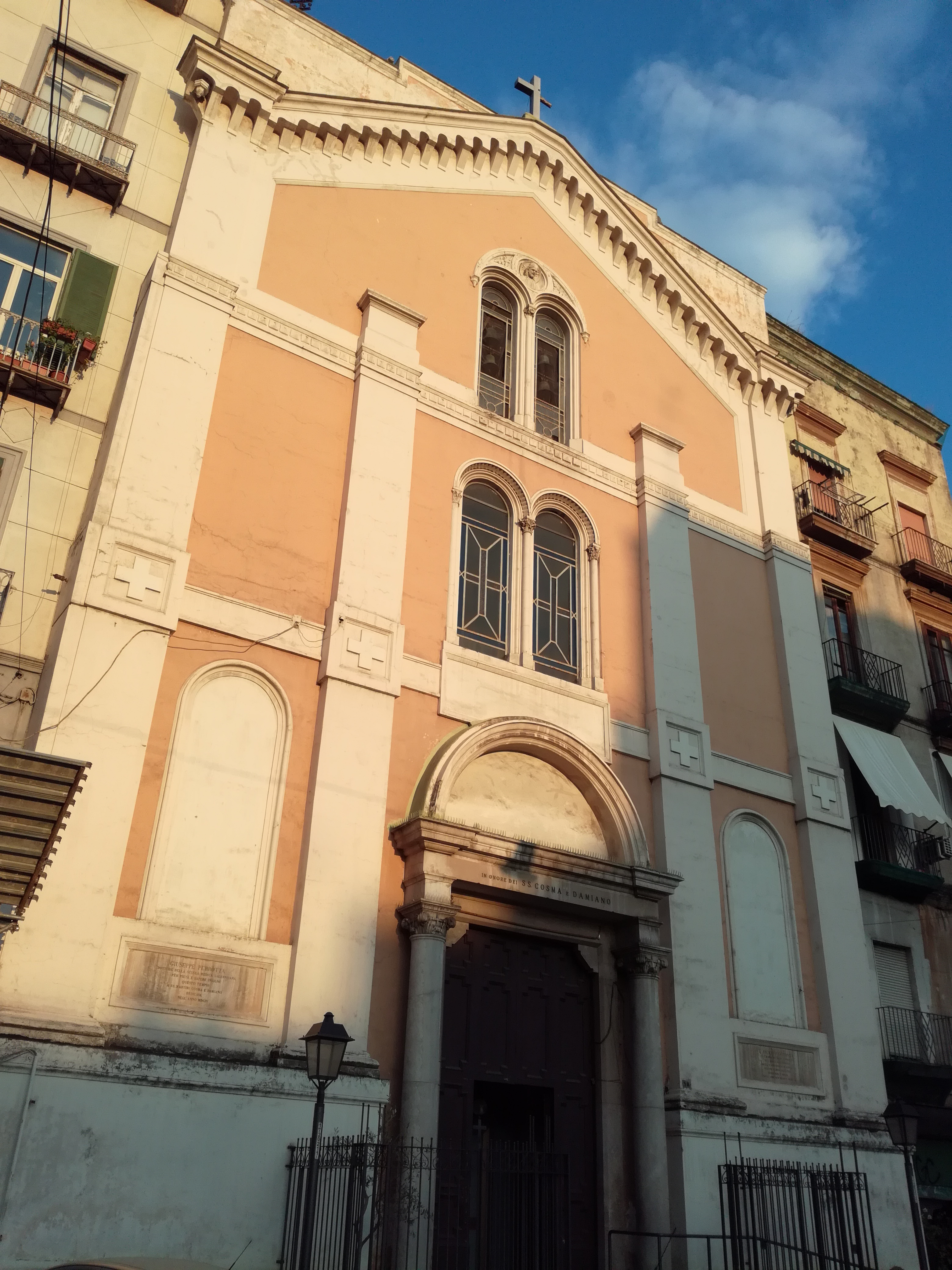 Chiesa dei Santi Cosma e Damiano a Porta Nolana (Napoli)